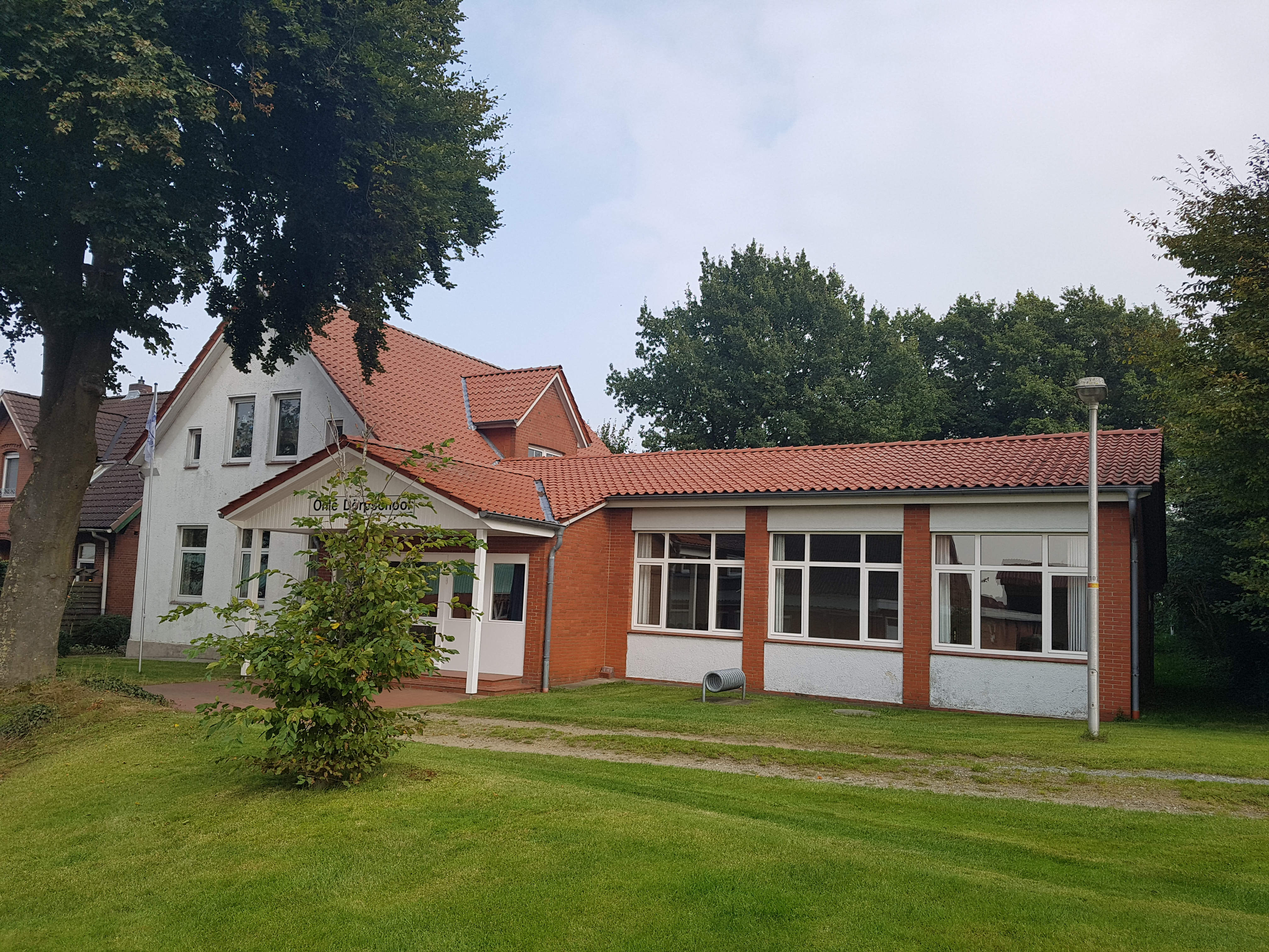 Ohle Dörpschool in Nindörp